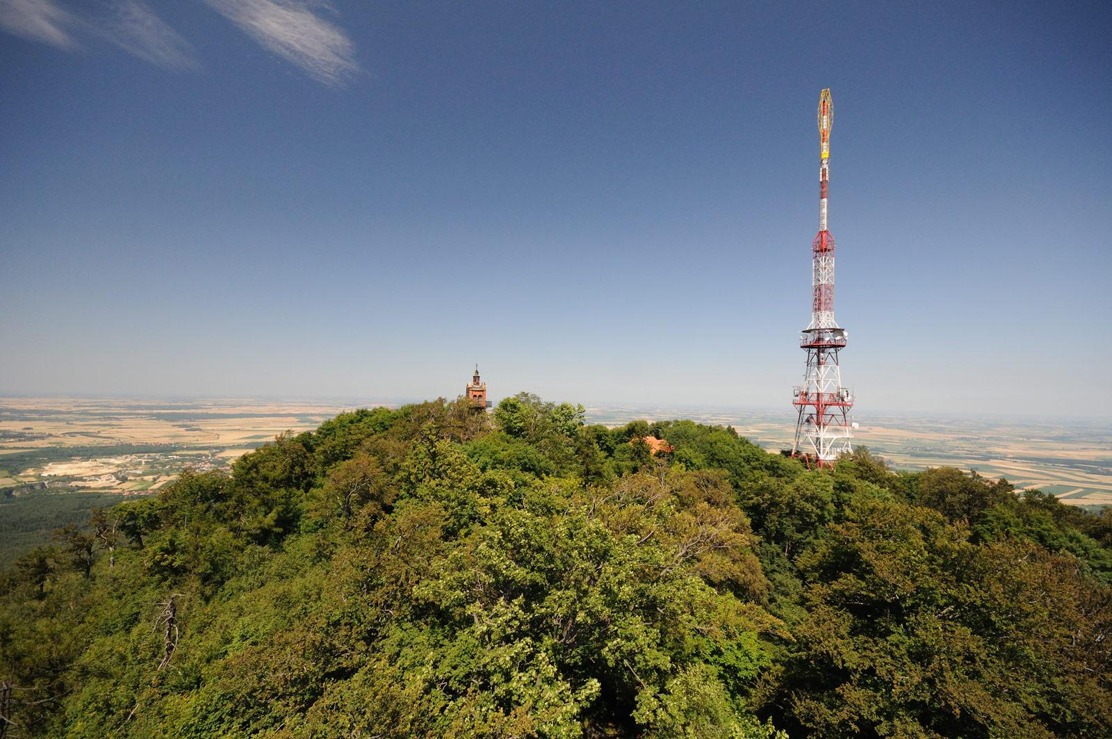 Na szczycie Ślęży - widok z wieży widokowej.